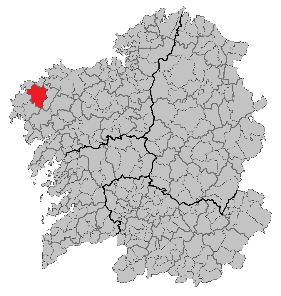 Mapa coa localización do concello de Vimianzo.